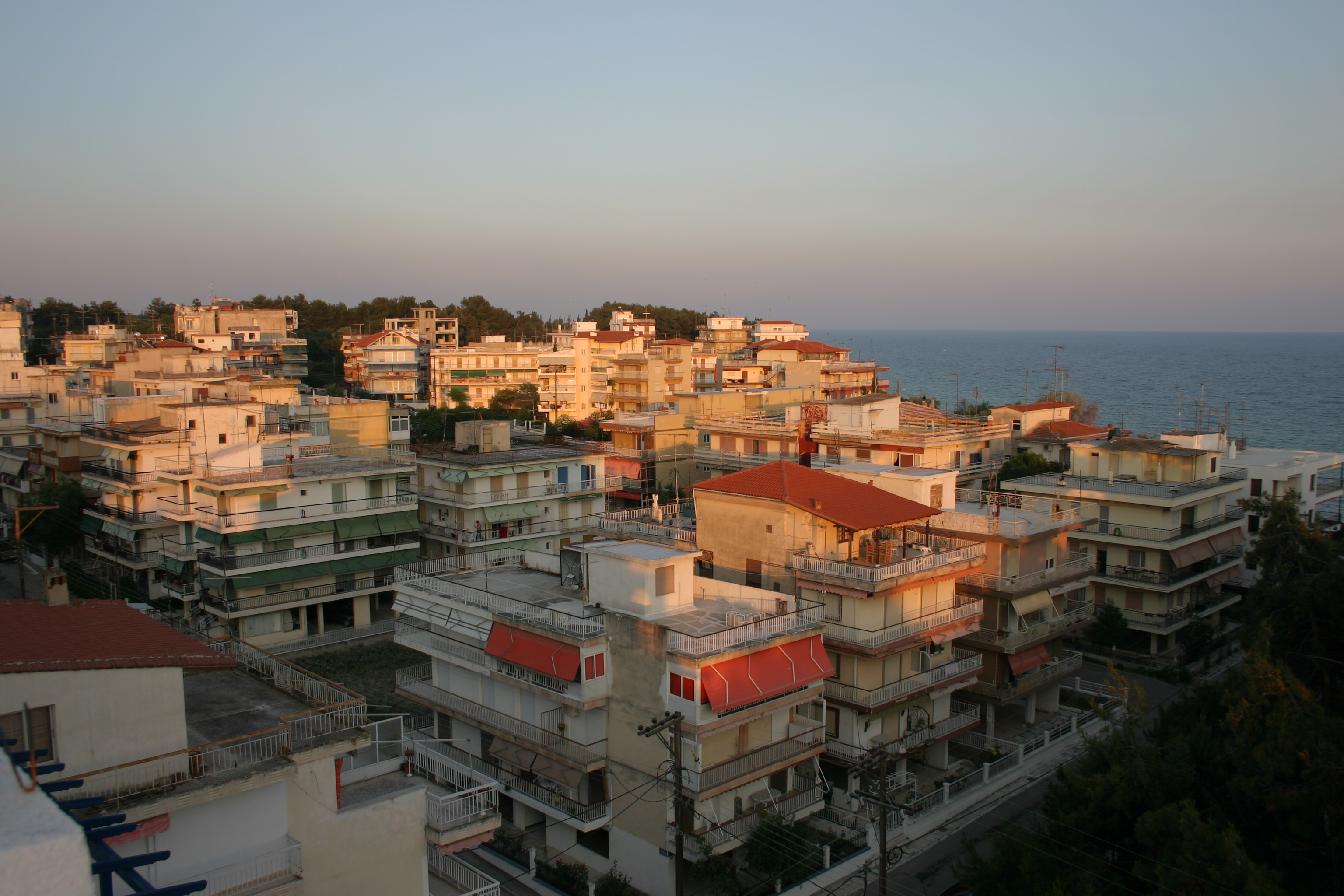 Kallikratia, Chalkidiki, Greece - View on city